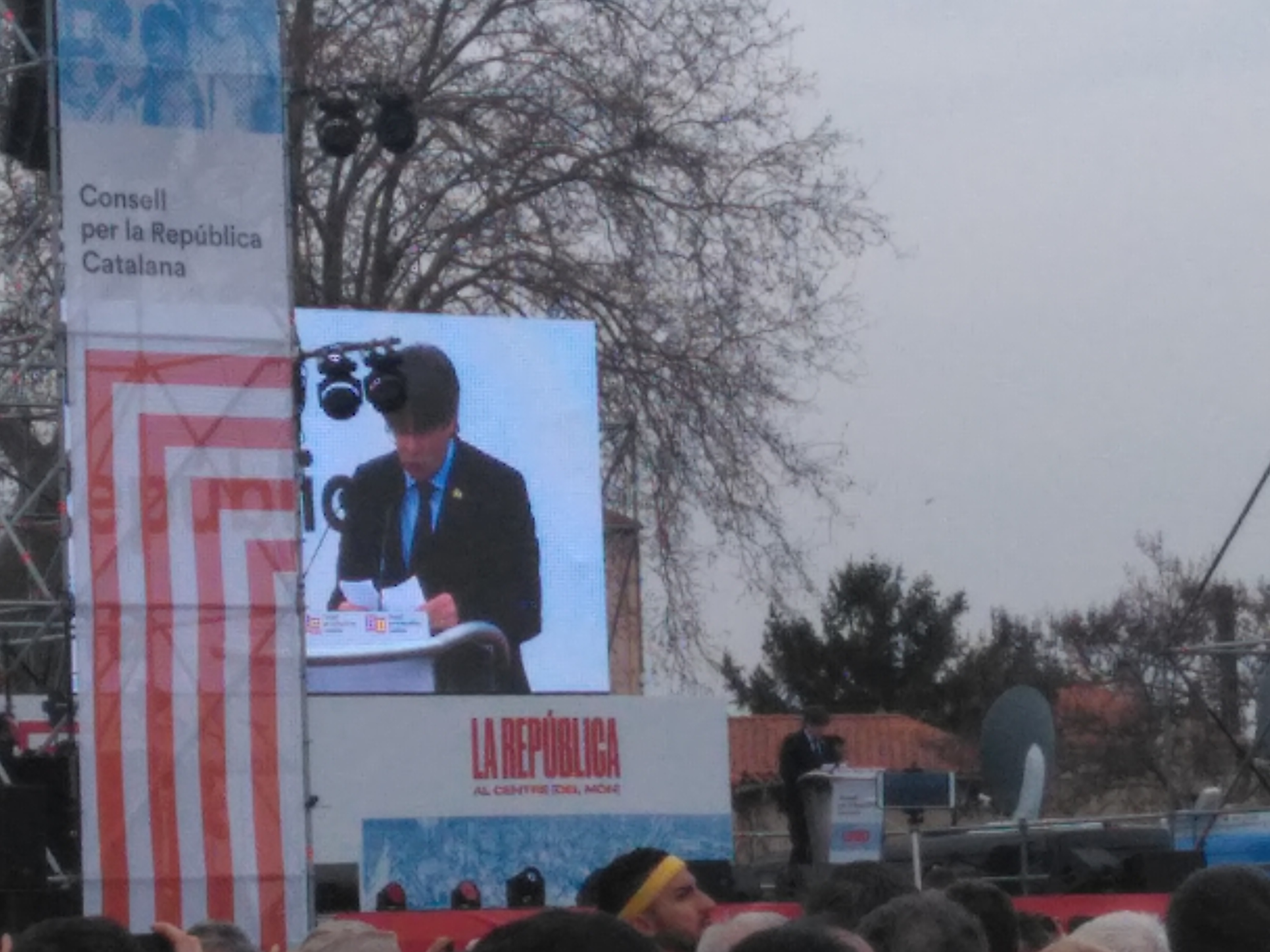 La República al centre (del món), acte a Perpinyà amb la presidència de l'expresident de la Generalitat de Catalunya Carles Puigdemont, Toni Comín i Clara Ponsatí, tots tres eurodiputats i exiliats.